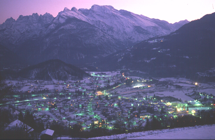 panorama serale di Agordo (BL), Italia/Italy